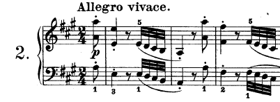 Compassos iniciais do primeiro movimento da Sonata Op. 2 n. 2 de Beethoven